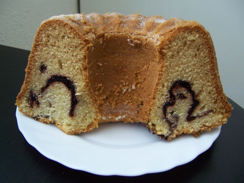 Bábovka dvoubarevná / Bábovka cake (Czech Rep., Germany, Austria, Hungary etc.)